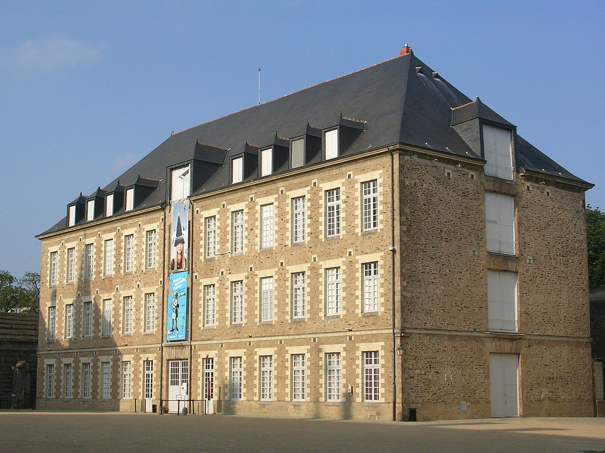 Château des ducs de Bretagne, le Harnachement, Nantes (France)